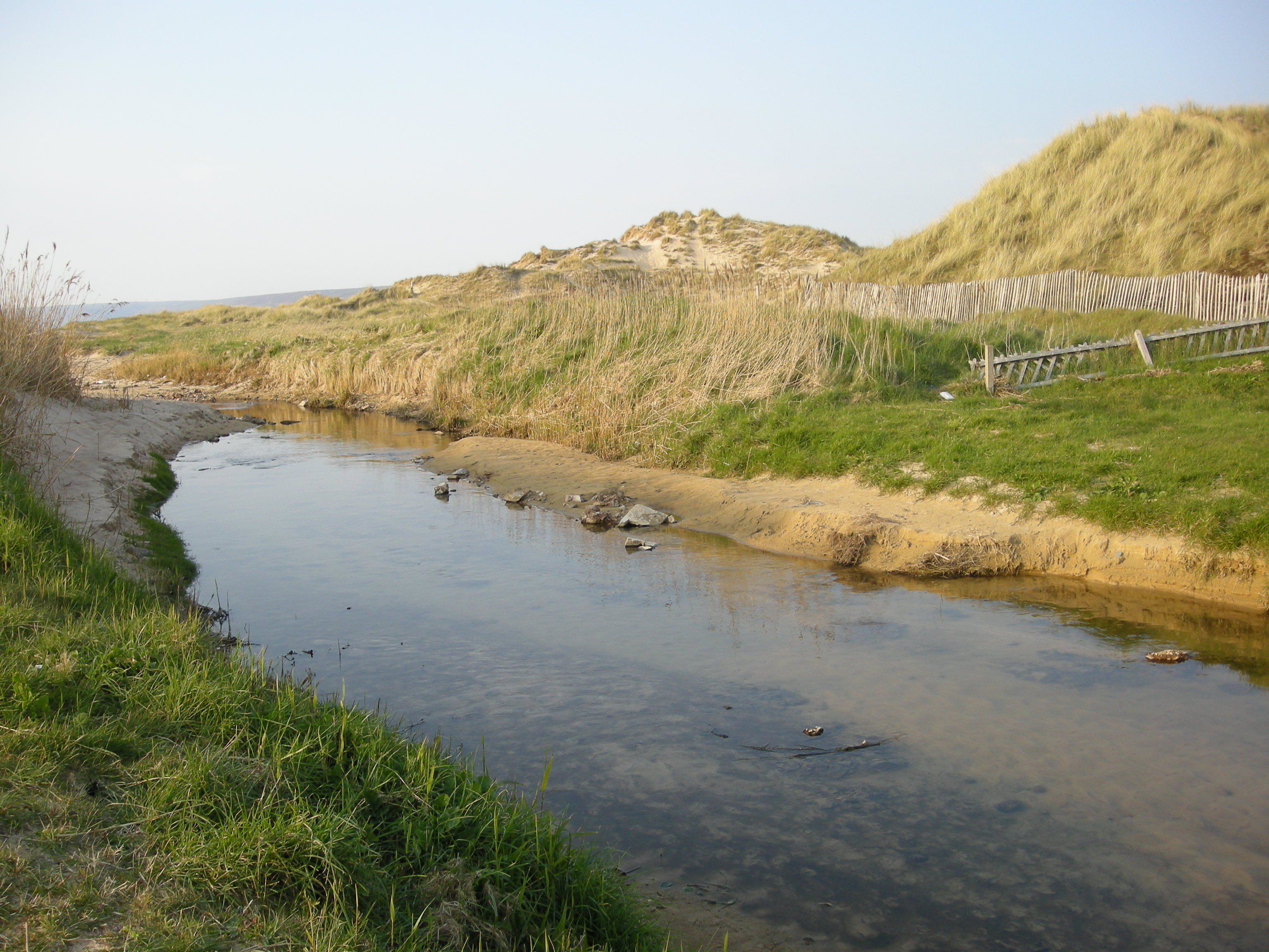 Le Petit Douet à Siouville-Hague (Manche, Normandie, France)